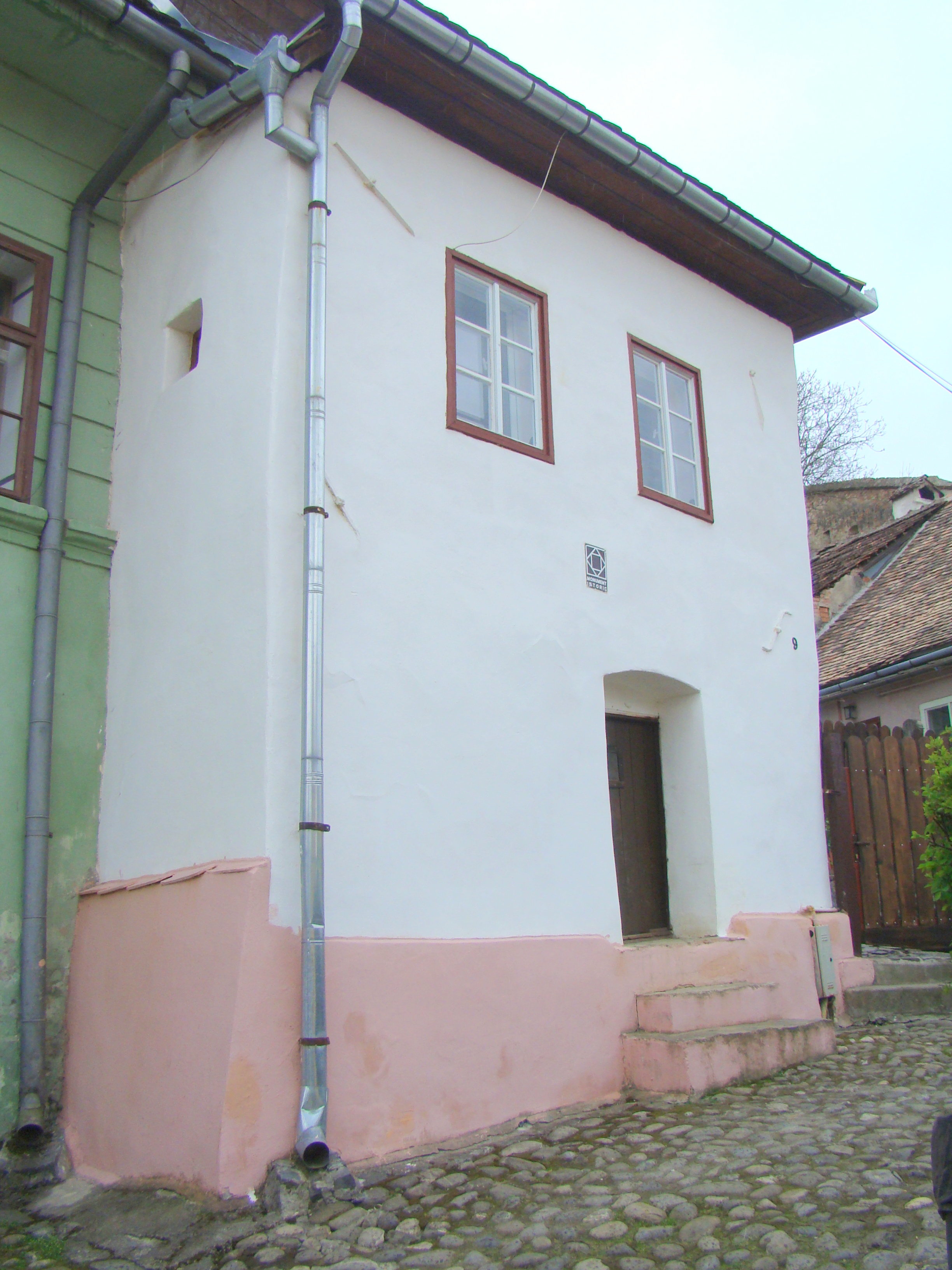 Casa Baschner, municipiul Sighișoara, str. Cojocarilor 9 sec. XVII - XVIII, sec. XX